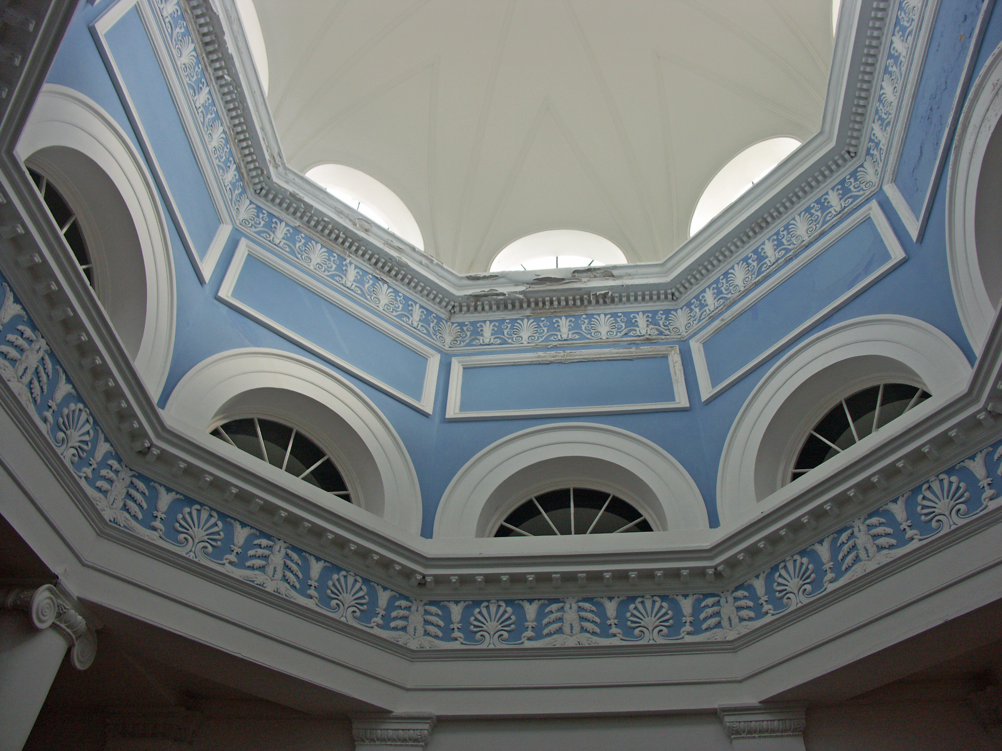 Décoration intérieure de la Villa Mon Repos (1824) à Corfou